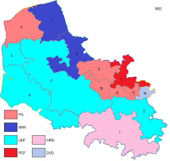 Pas-de-Calais en 1993